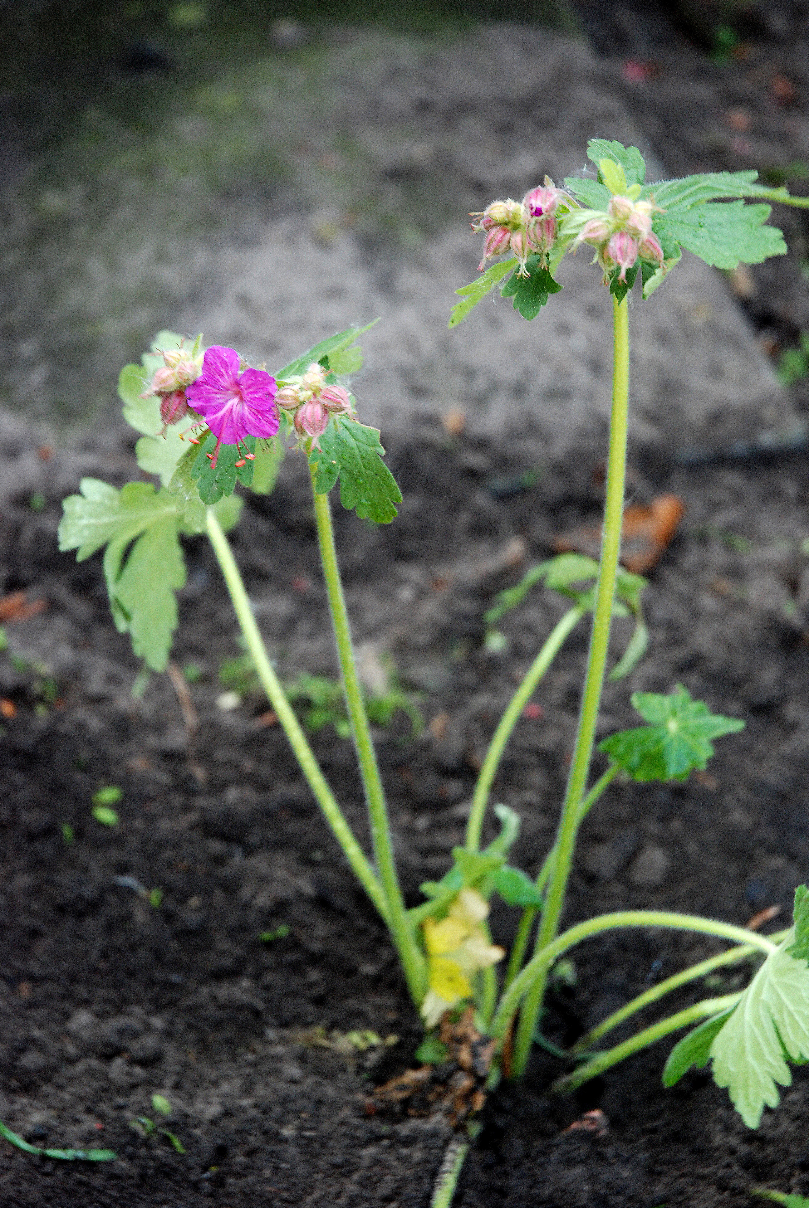 Rotsooievaarsbek (Geranium macrorrhizum)